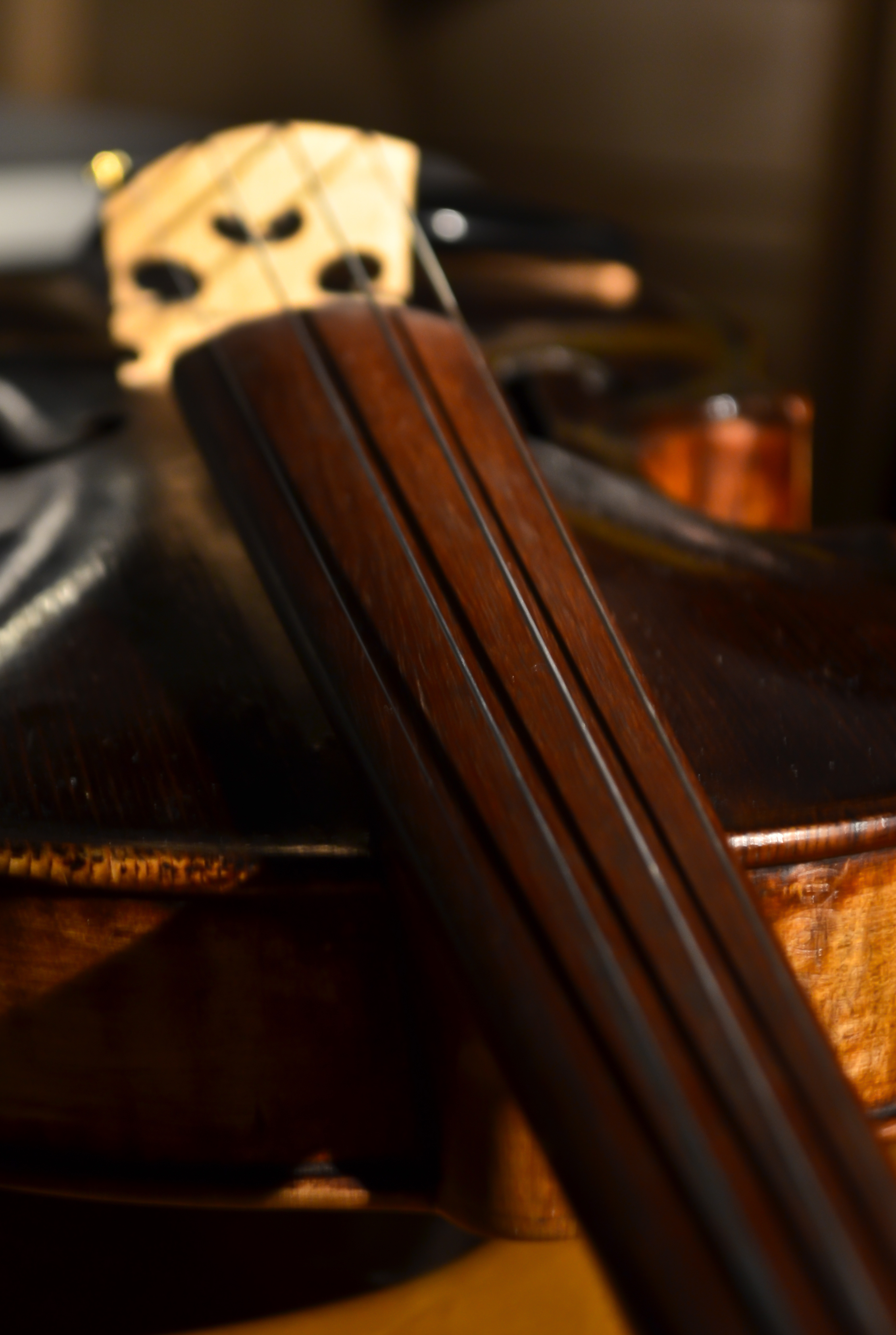 Μεταλλικές χορδές σε βιολί